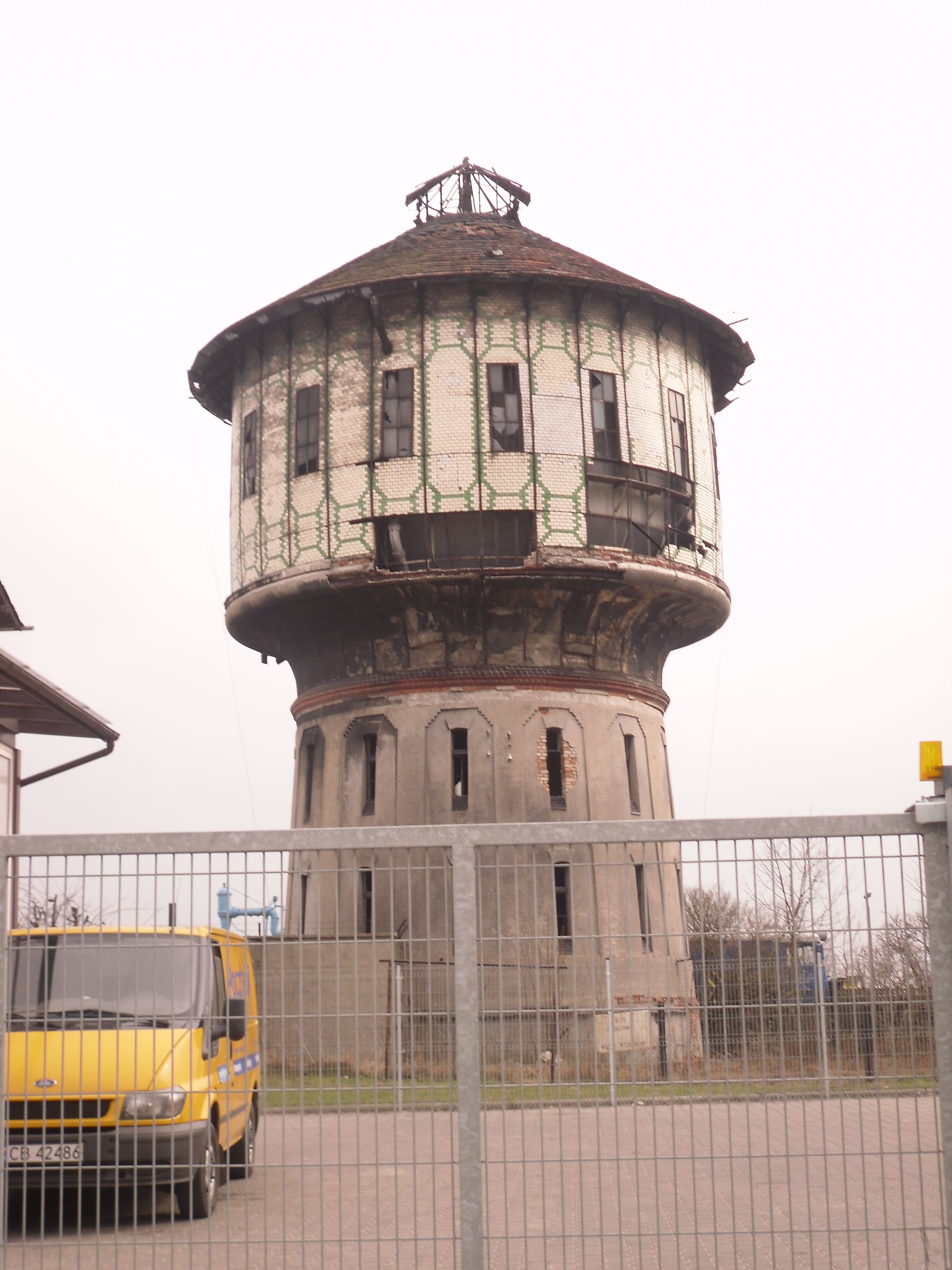 Wieża wodna w Chojnicach